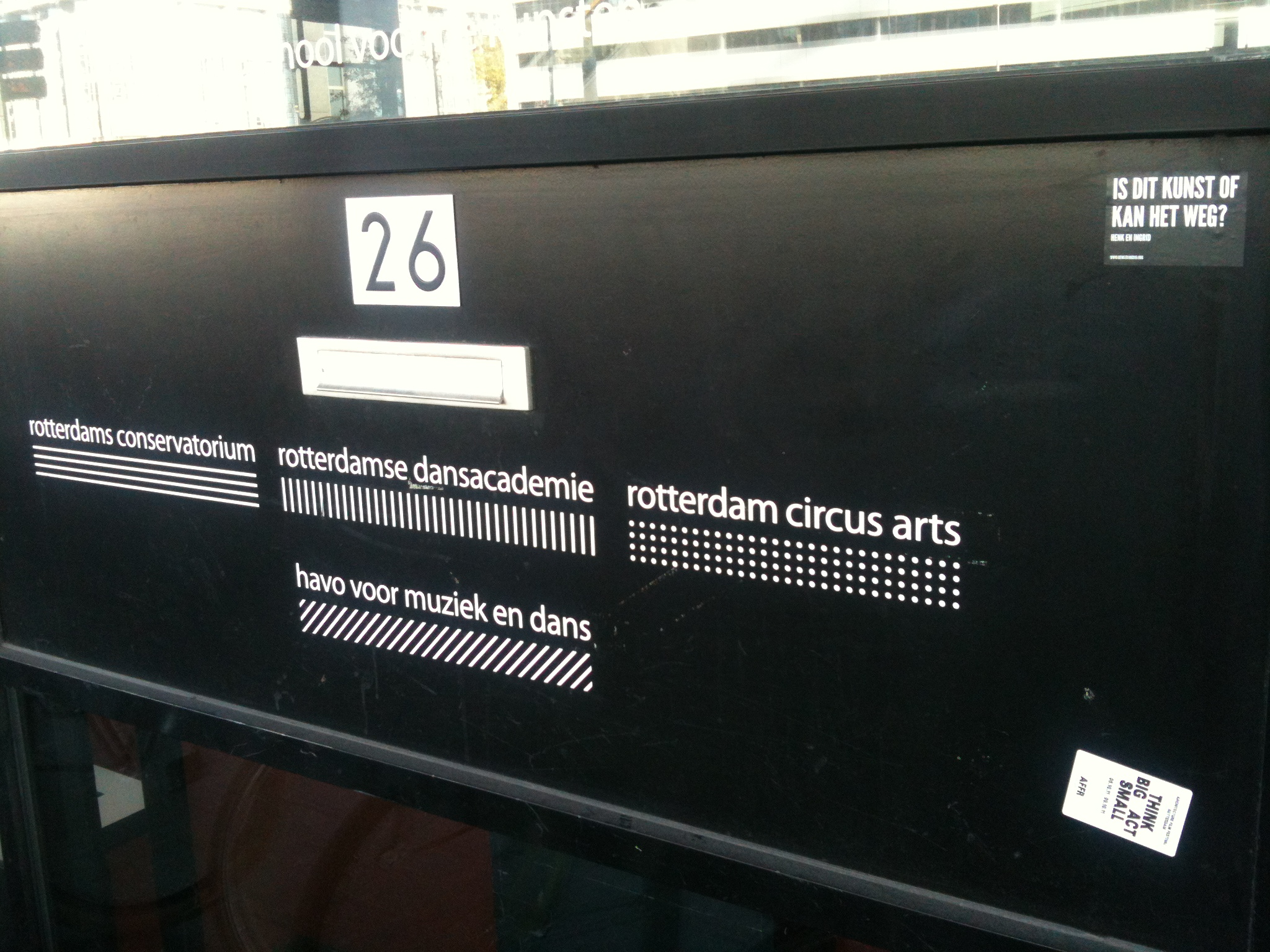 Codarts schools